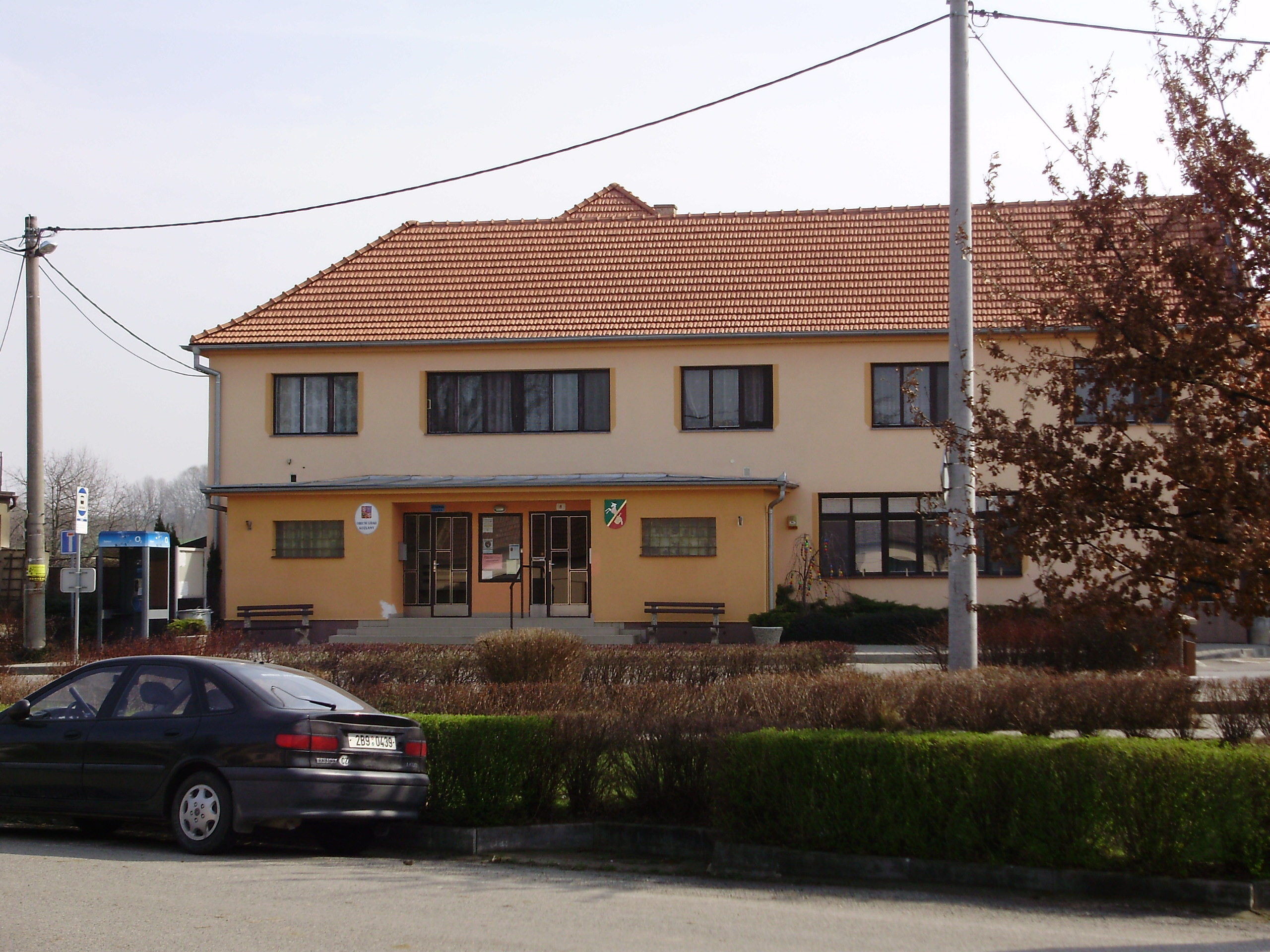 Obecní úřad Kozlany (2009).